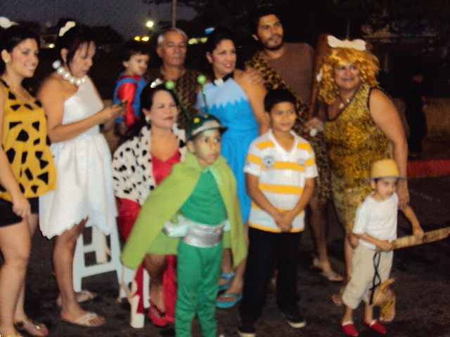 Cosplays en la ciudad de punto fijo, venezuela de la serie animada Los Picapiedra.